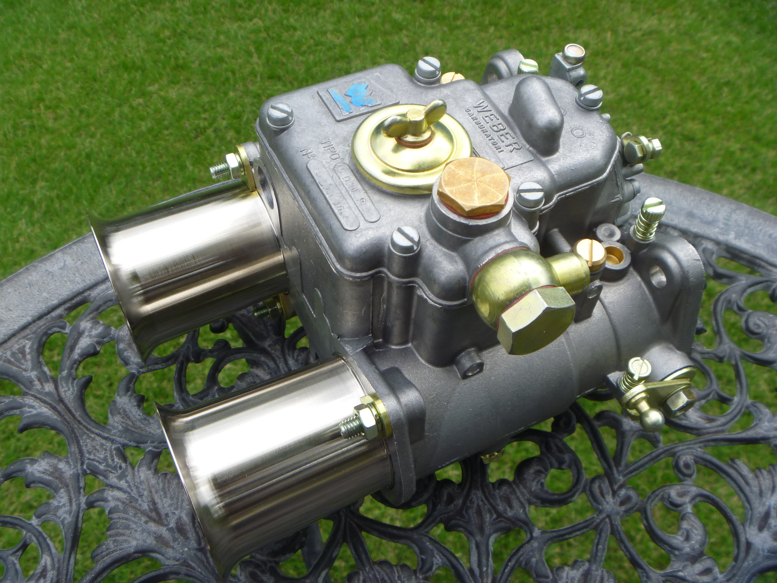 Weber45DCOE9